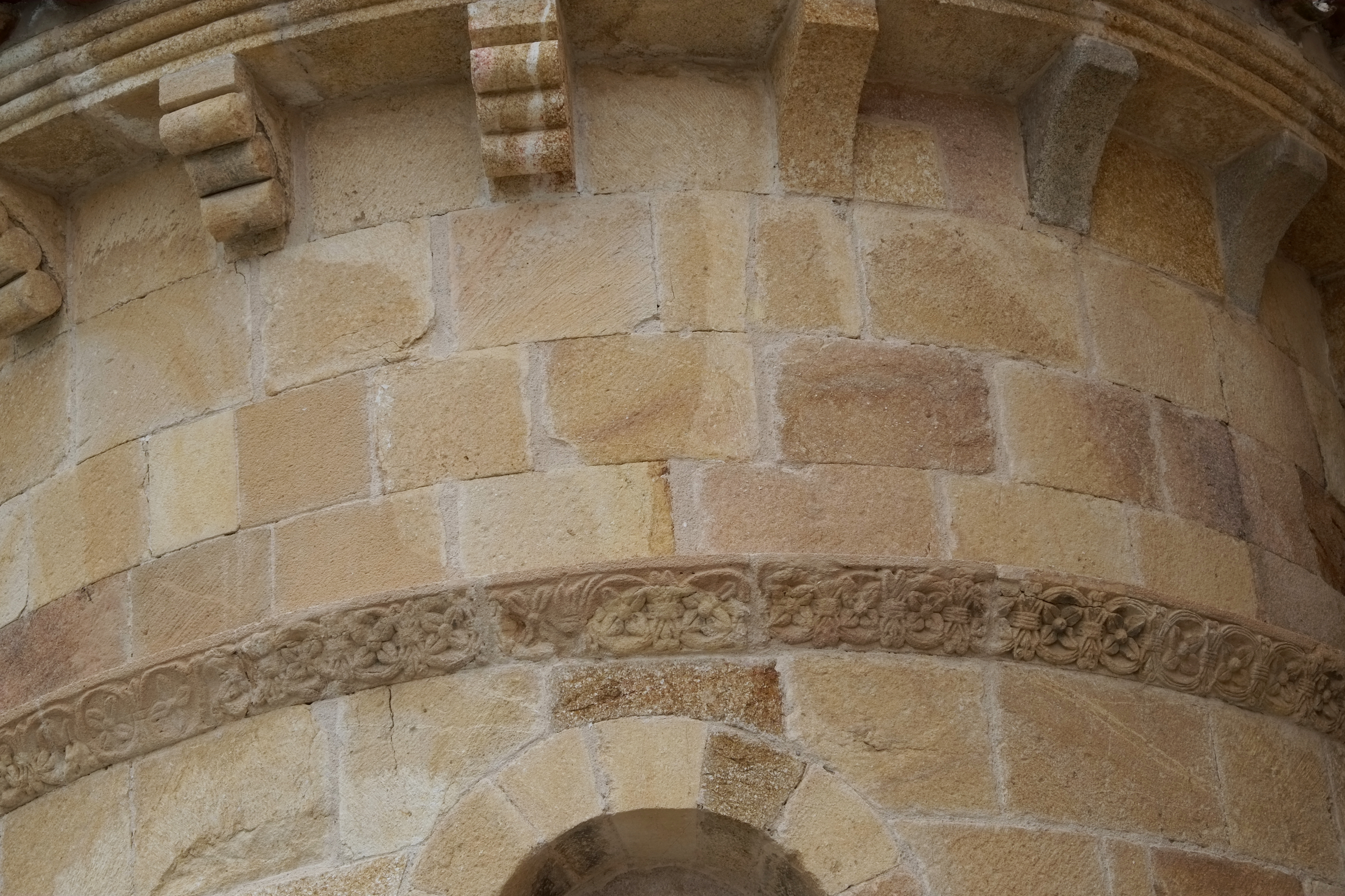 Kirche San Andrés in Ávila (Kastilien-León/Spanien), Fries